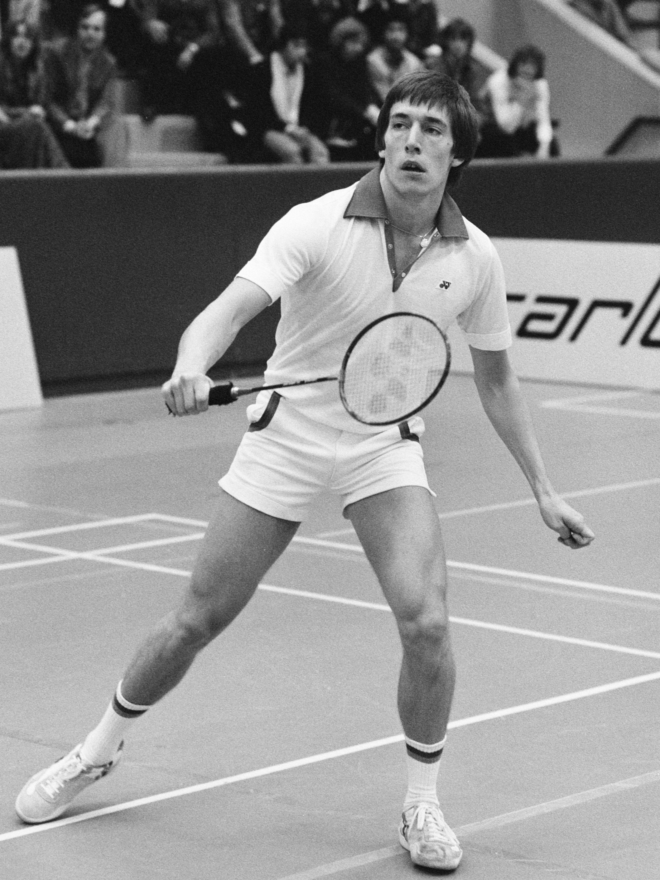 Rob Ridder in aktie 9 december 1979